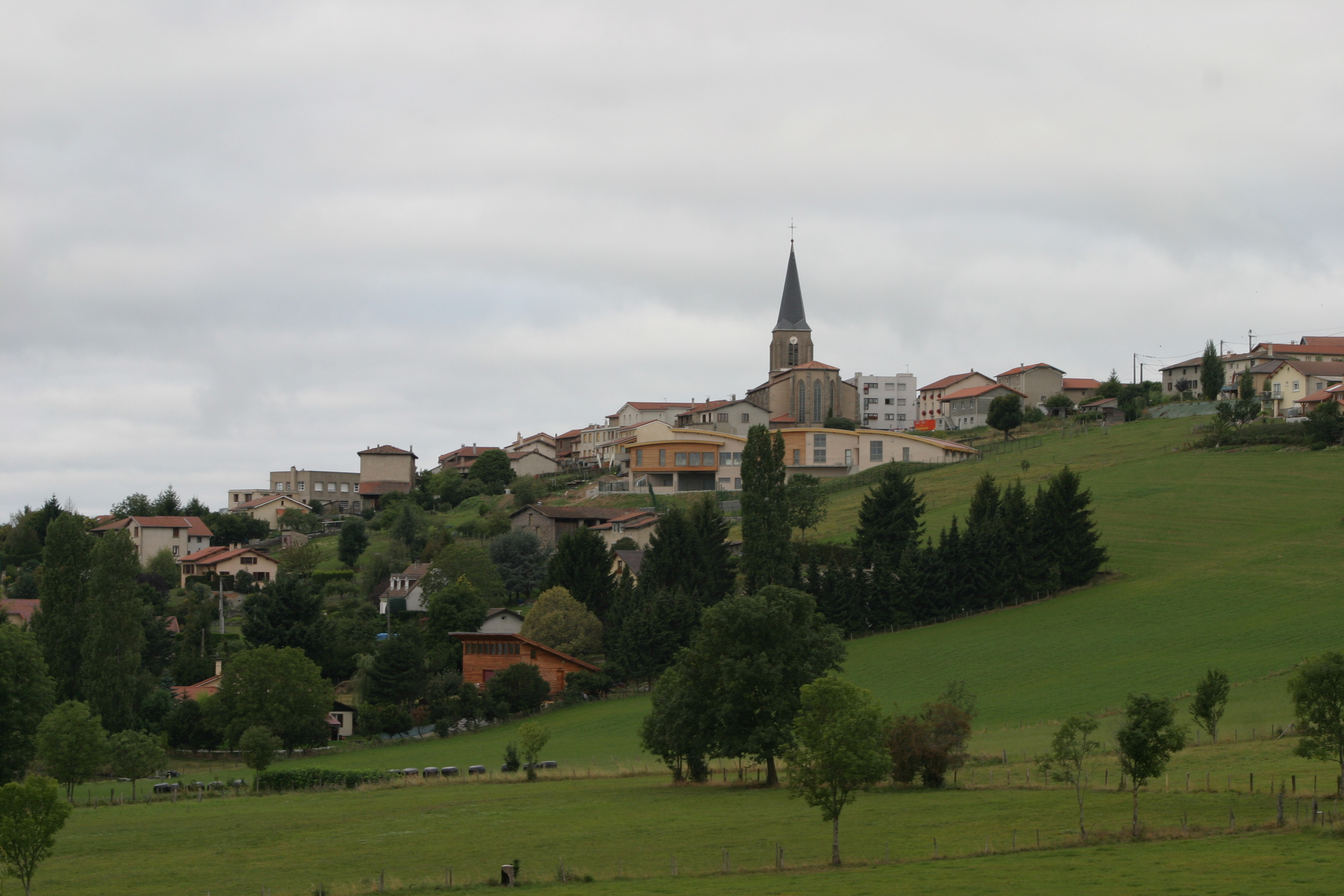 Village de Saint Christo en Jarez (42320) dans la Loire